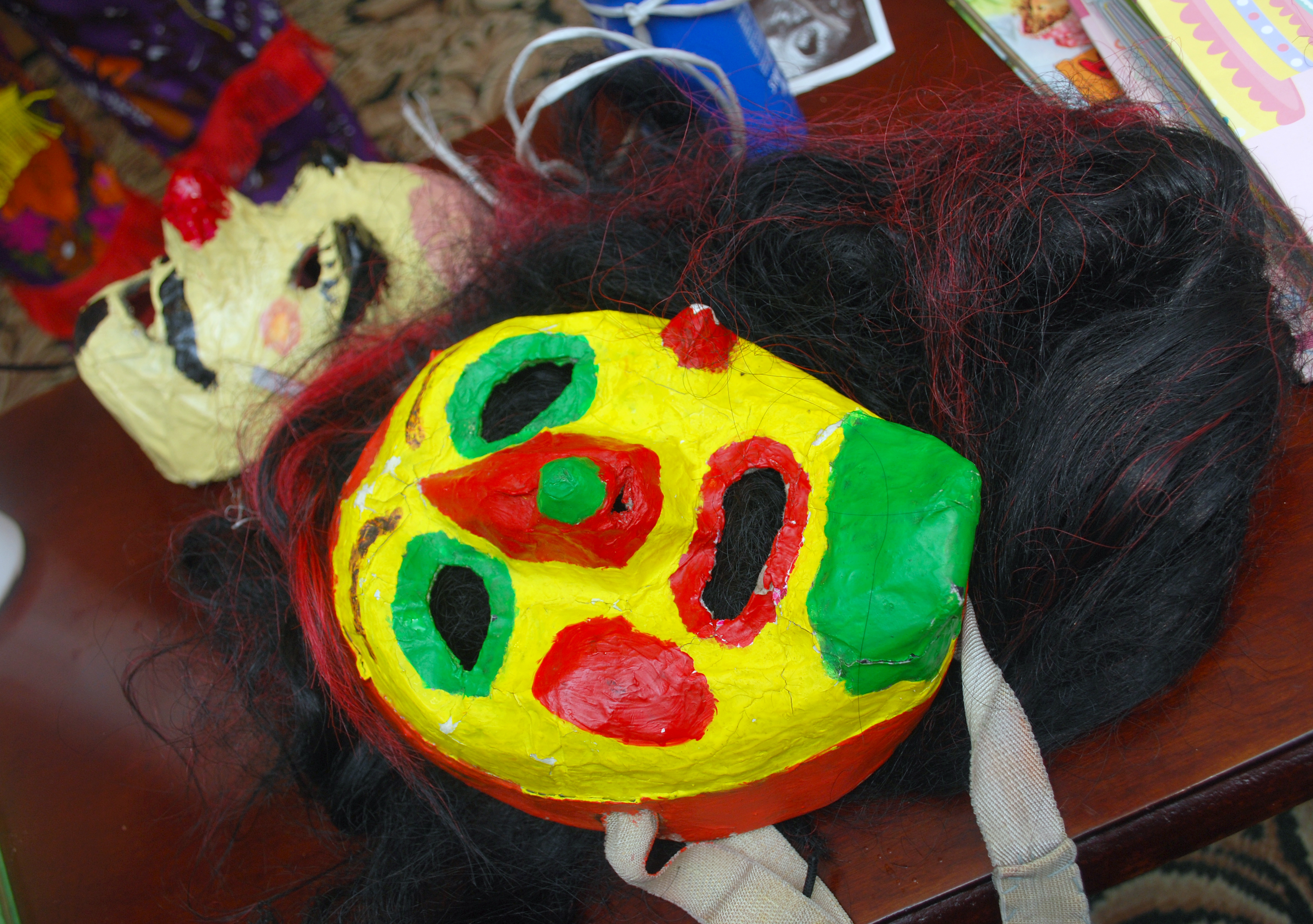 Śmierguśnicy z Wilamowic - maski